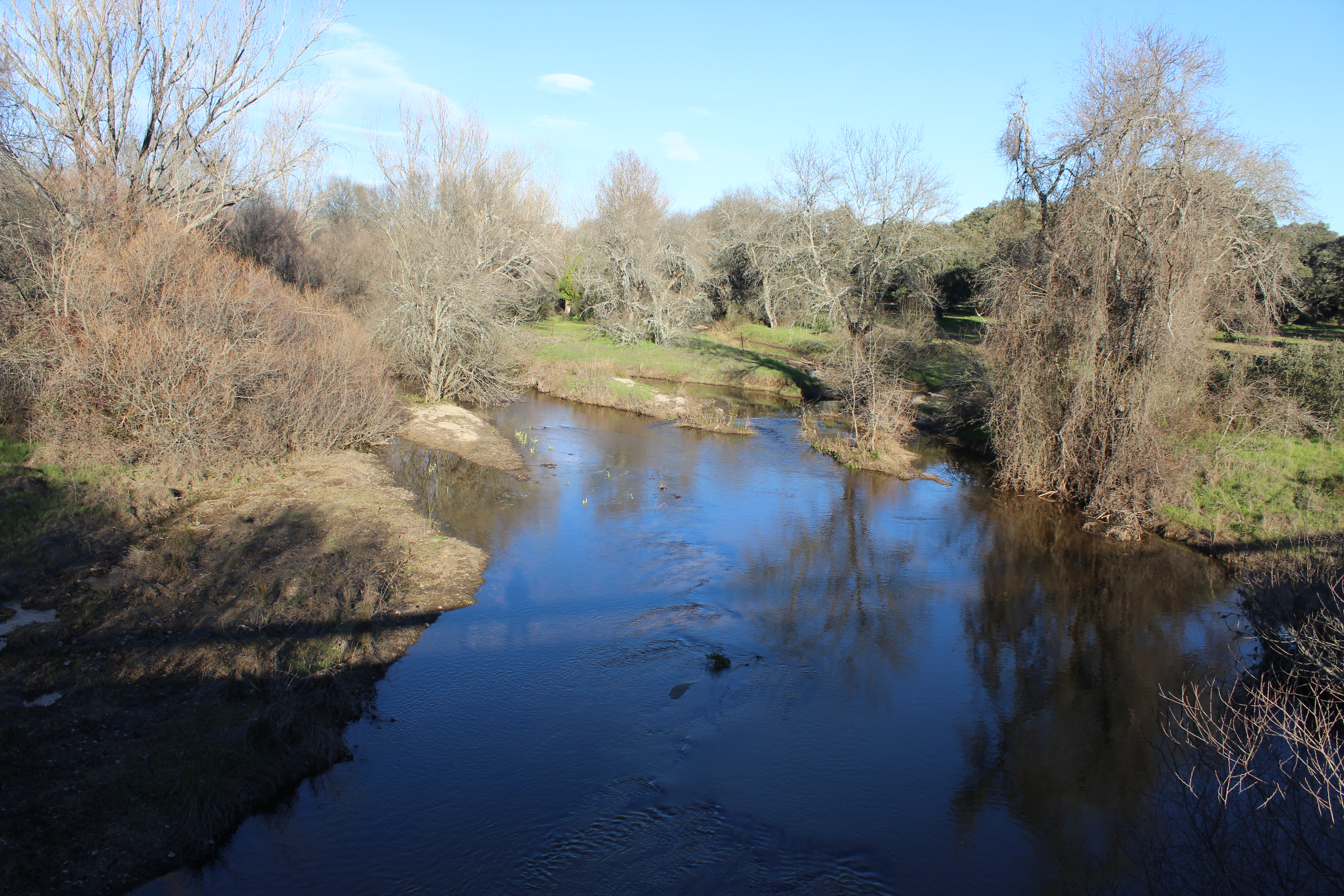 Río Guadyerbas, provincia de Toledo.